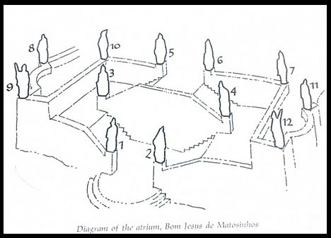 Diagrama ubicación profetas